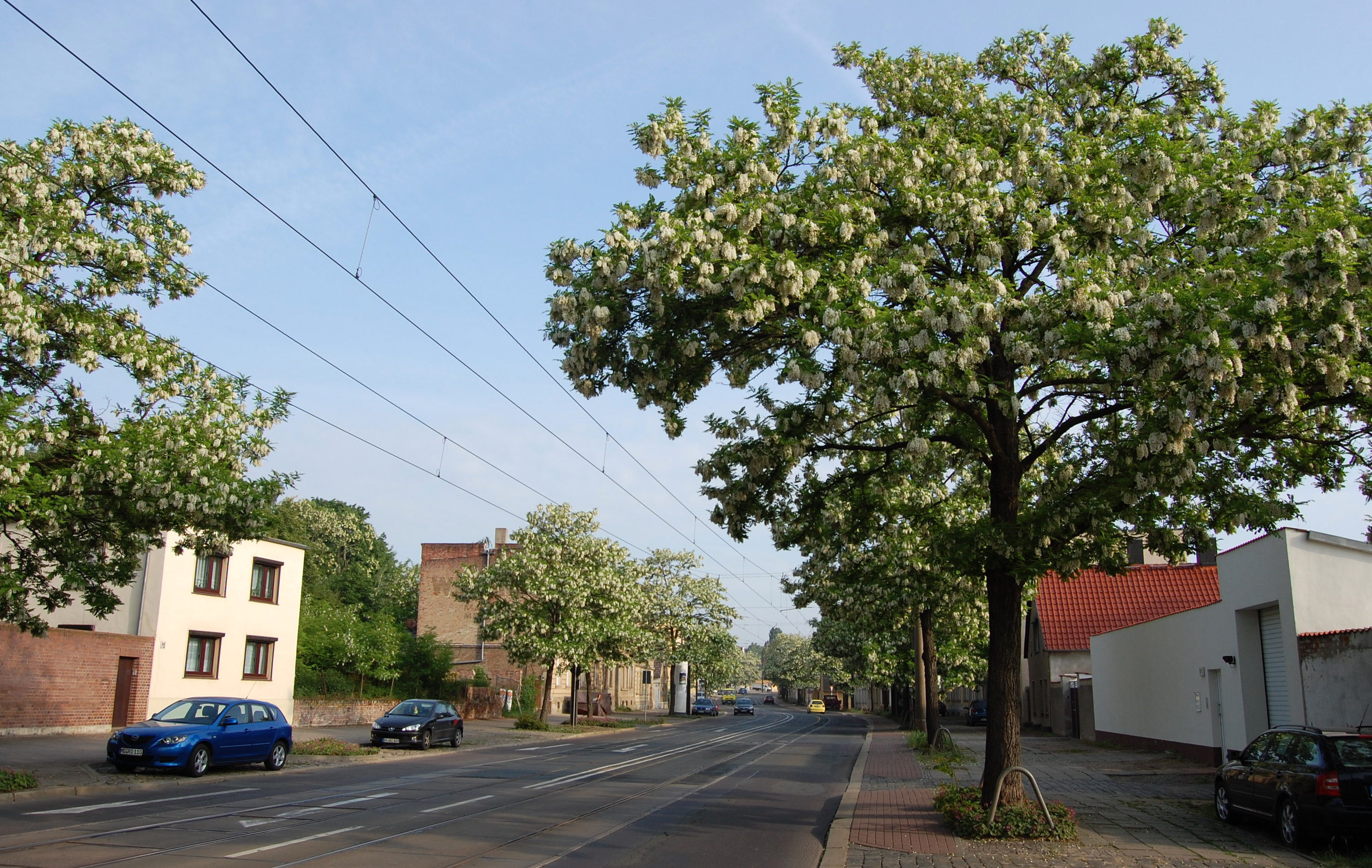 Straße Alt Westerhüsen in Magdeburg-Westerhüsen, Blick von Süden